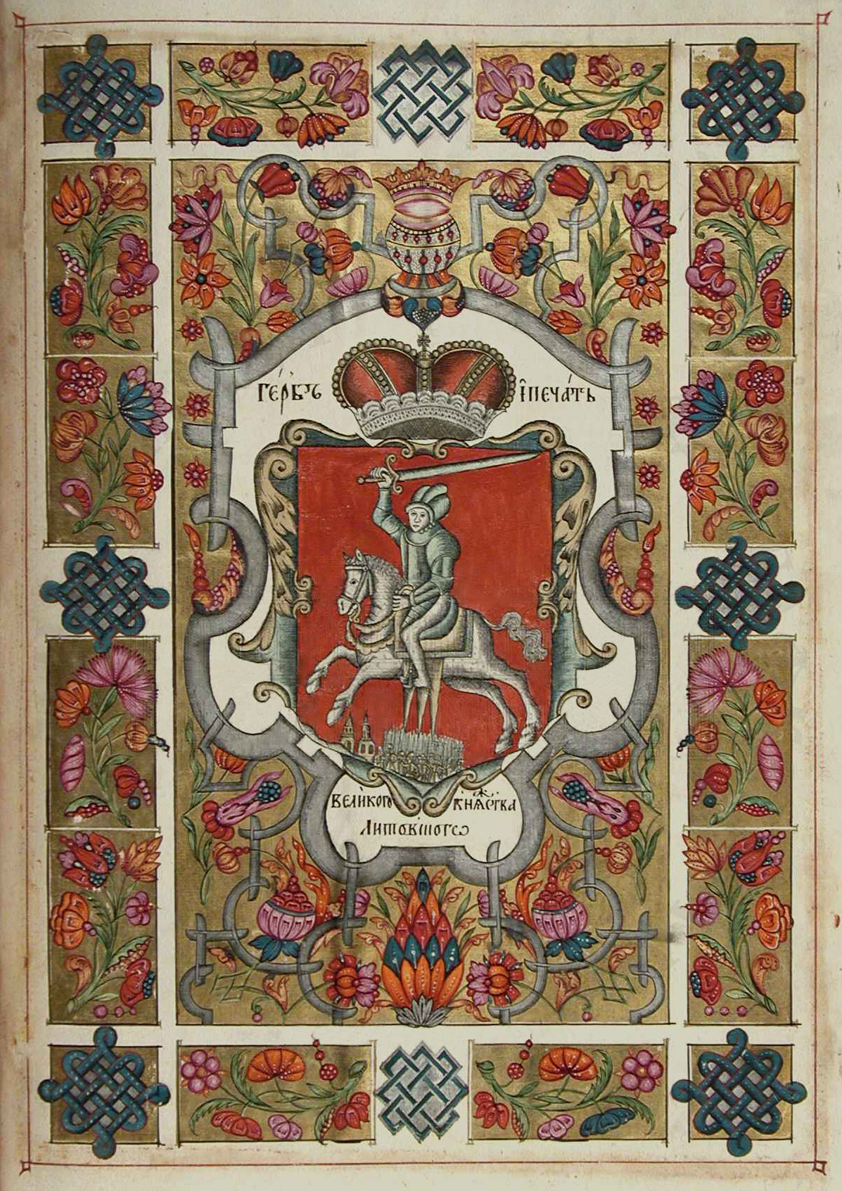 Беларуская (тарашкевіца): Герб Вялікага Княства Літоўскага Пагоня (Pahonia) з «Маскоўскага тытулярніка»